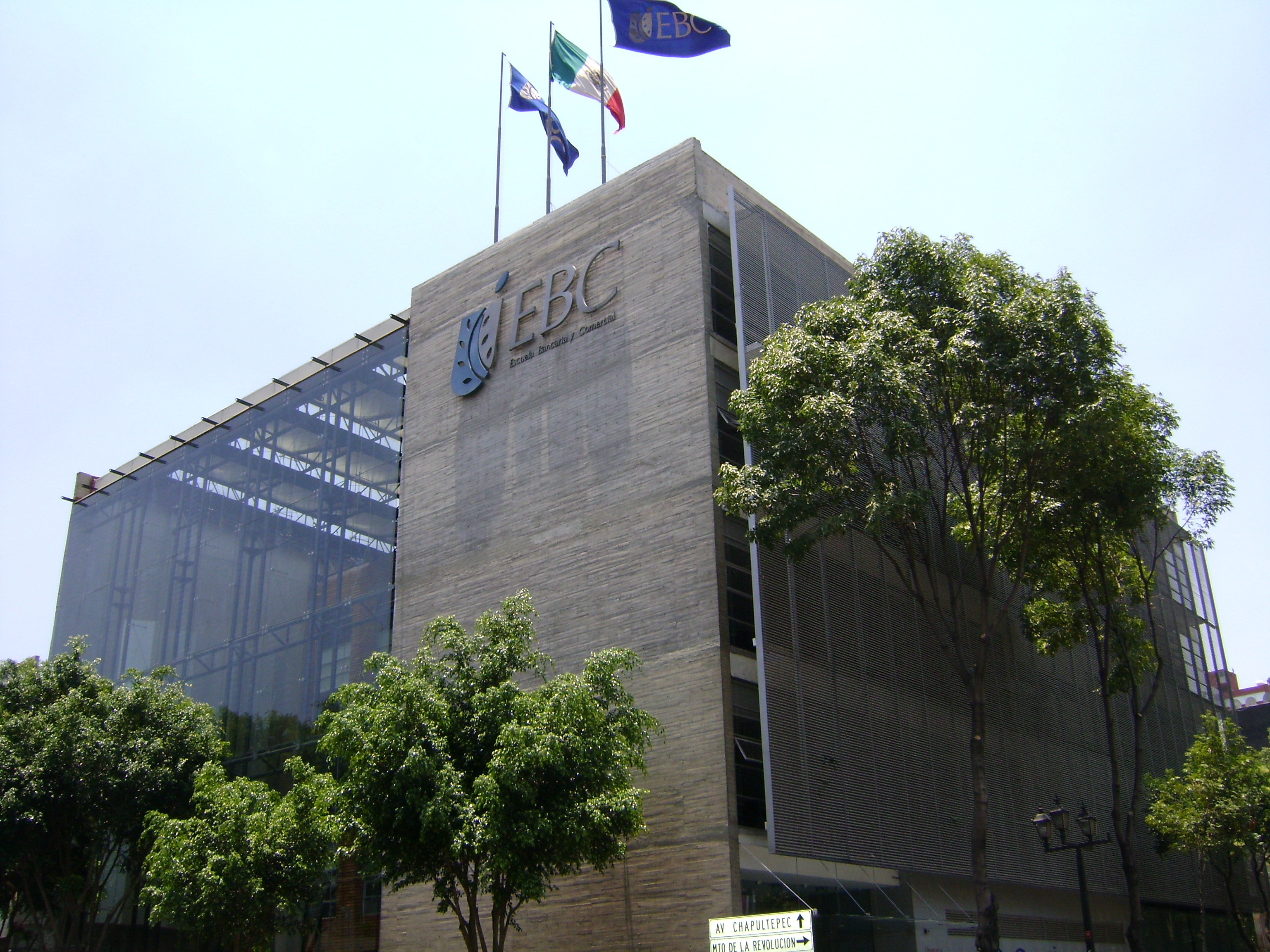 PLANTEL DINAMARCA DE LA EBC, TOMADA DESDE EL CRUCE DE LAS CALLES DE HAMBURGO Y DINAMARCA